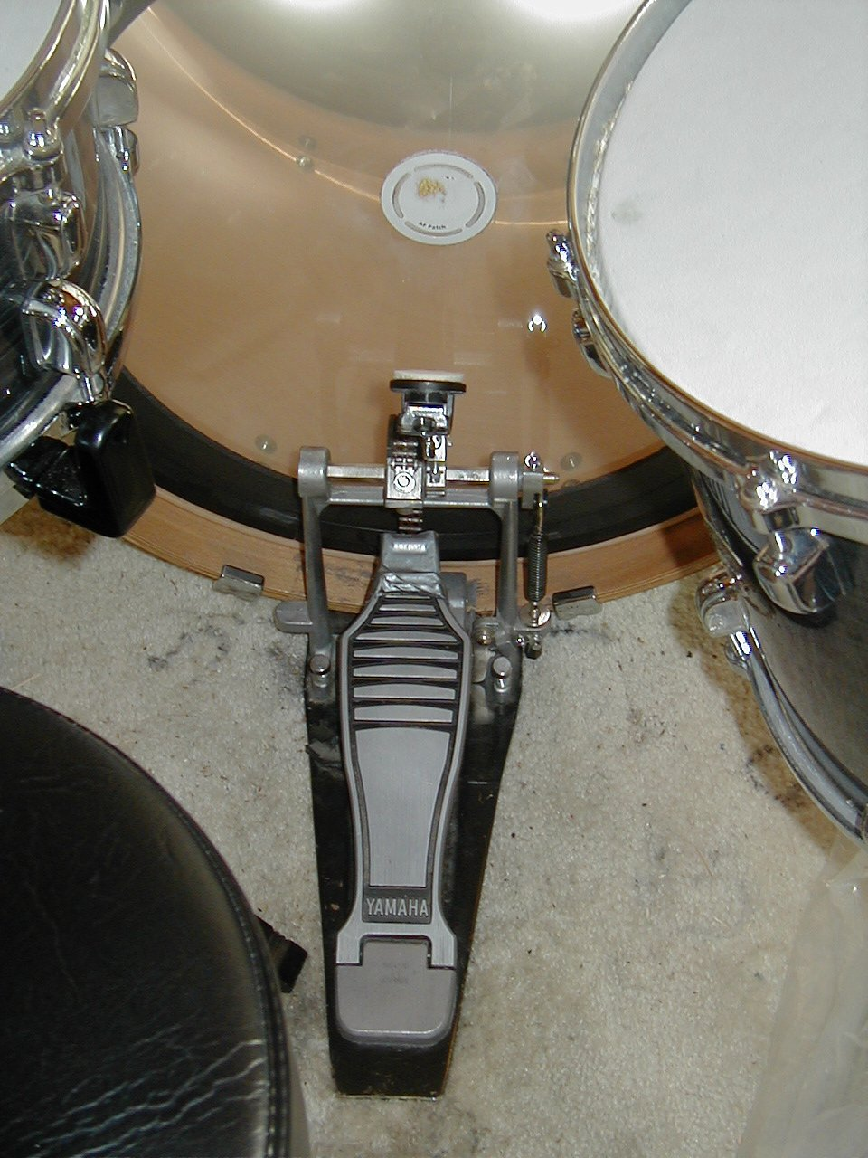 A Yamaha bass drum pedal on a Tama drum set.